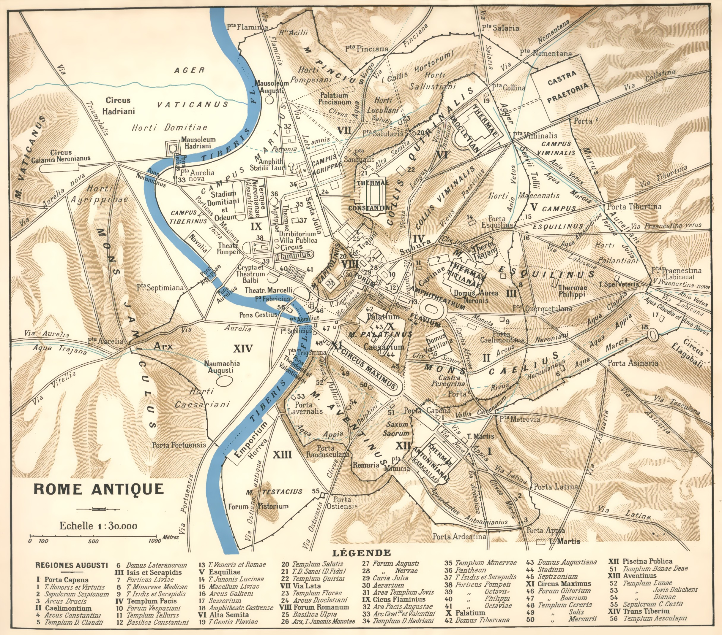 Mapa citadino da Roma Antiga